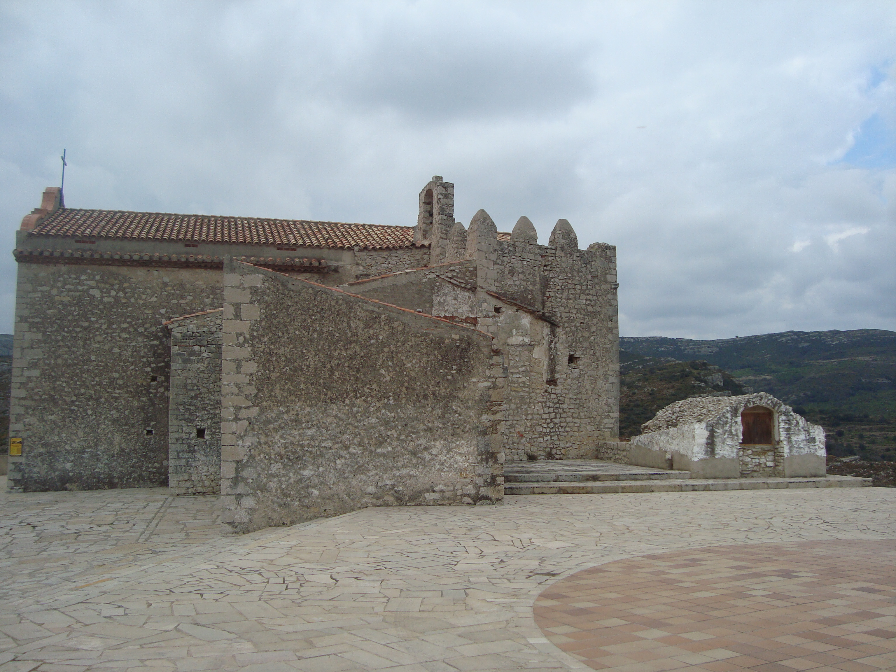 Ermitori de Sant Marc de la Barçella, Xert